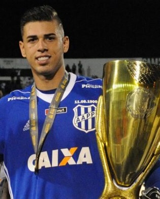 Ivan Quaresma, Goleiro da Associação Atlética Ponte Preta.